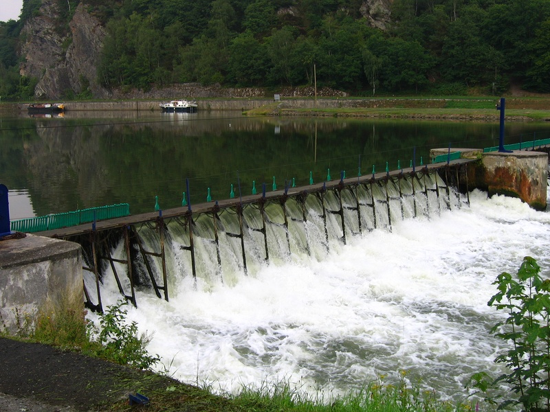 ancien barrage à aiguilles, Fumay (08), lieu-dit de la Roche de l'Uf, remplacé en 2017